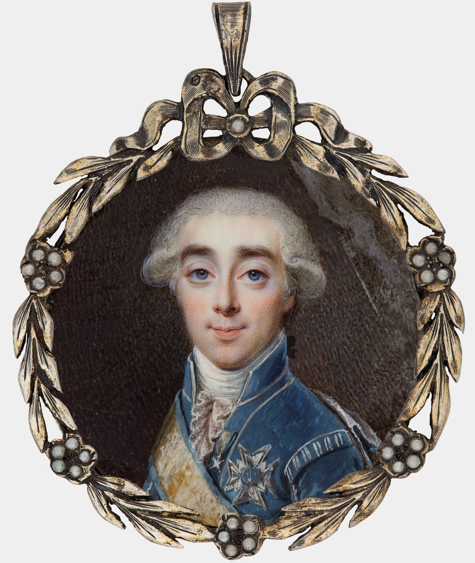 Axel von Fersen den yngre Svärdsordens ordensdräkt i samma snitt som Nationella dräkten, samt över axeln Svärdsordens band, samt dess kraschan på bröstet. Miniatyr av Niklas Lafrensen 1798.